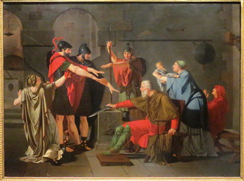 Il giuramento degli Orazi, olio su tela, 115 x 89 cm. Музей-усадьба Архангельское